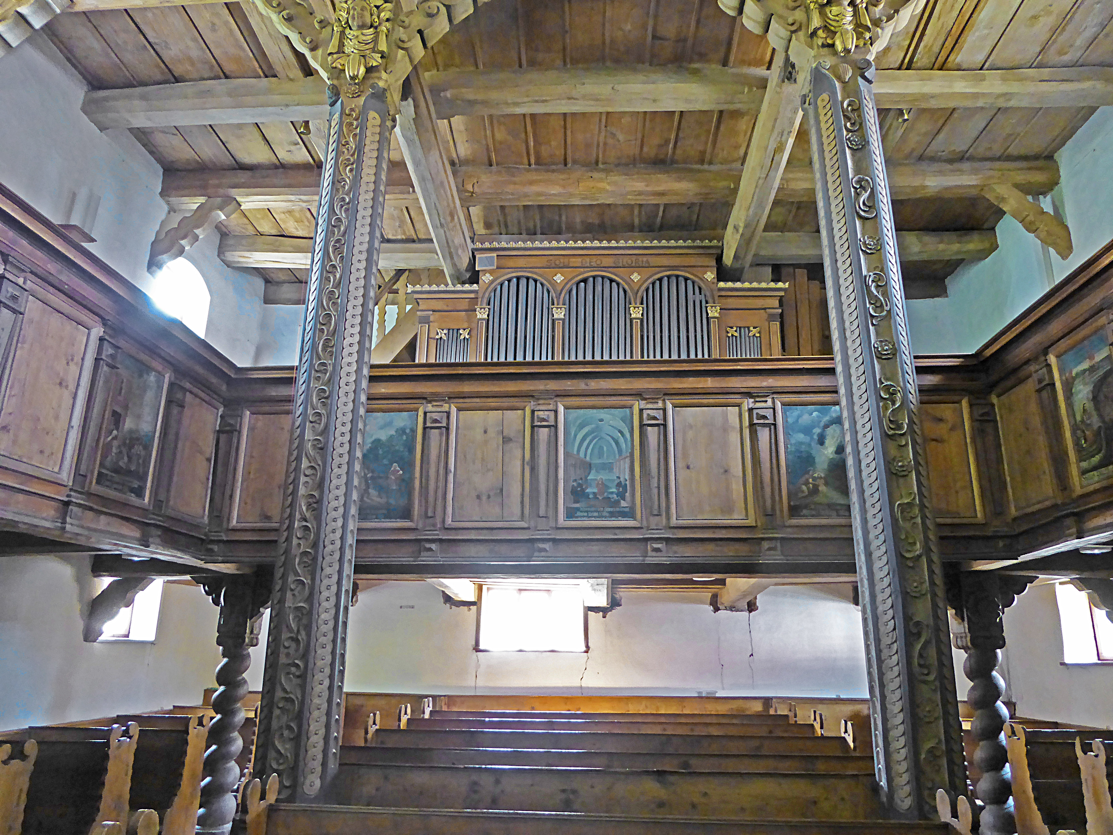 Trinitatiskirche (Hauröden)